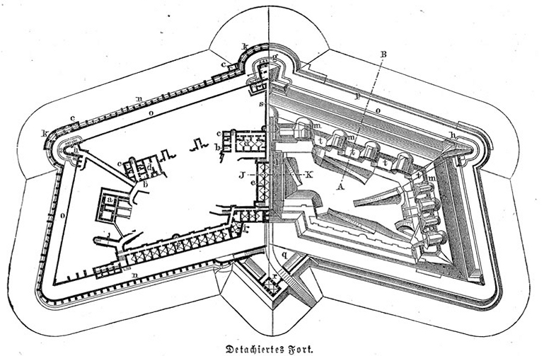 Detachiertes Fort, typisch für eine Anlage des 19. Jahrhunderts.